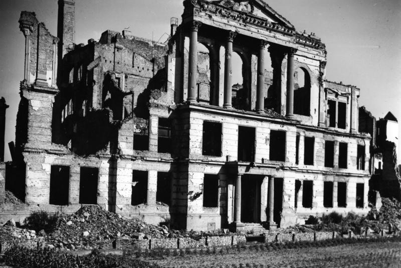 1951 Berlin Ruine des Volksgerichtshofes (1935 - 1945) in der Bellevuestraße 15. Vorher Reichswirtschaftsrat, davor Wilhelmsgymnasium. Architekt Adolf Lohse